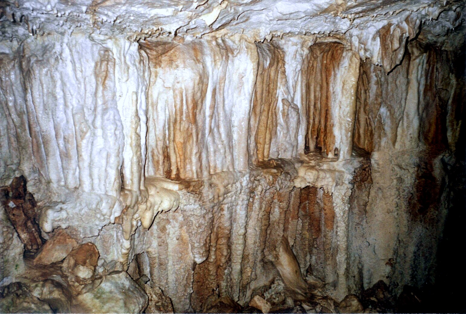 König-Otto-Tropfsteinhöhle, Germany